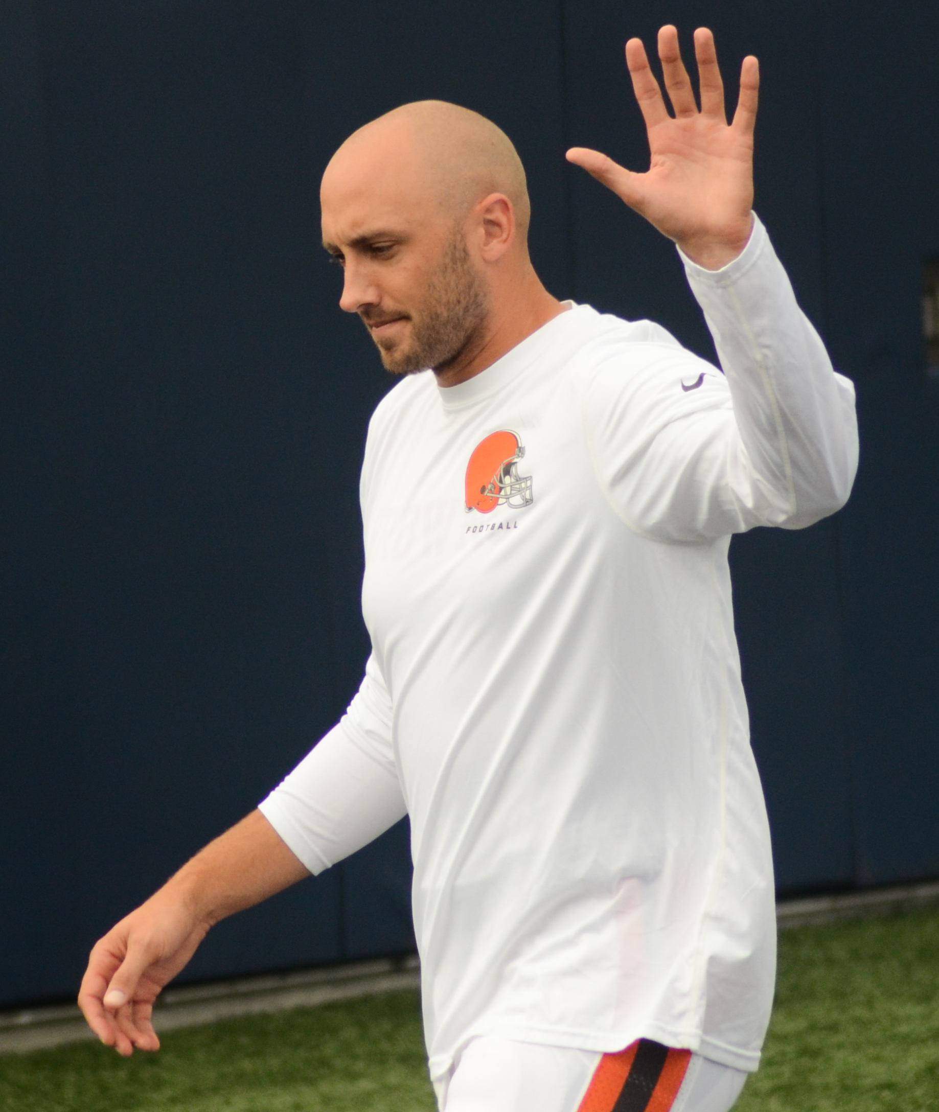 Brian Hoyer 2014 at Browns training camp.